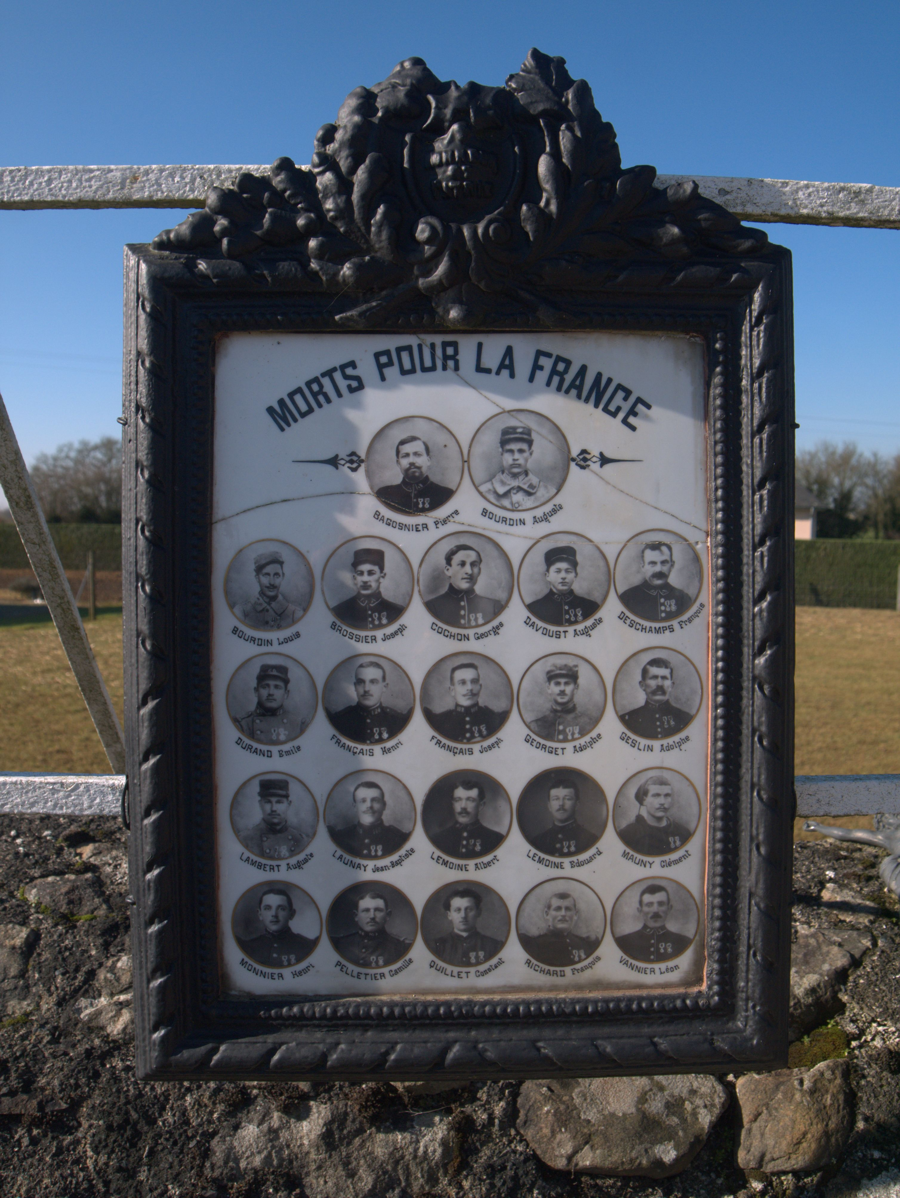 Voutré morts 14-18